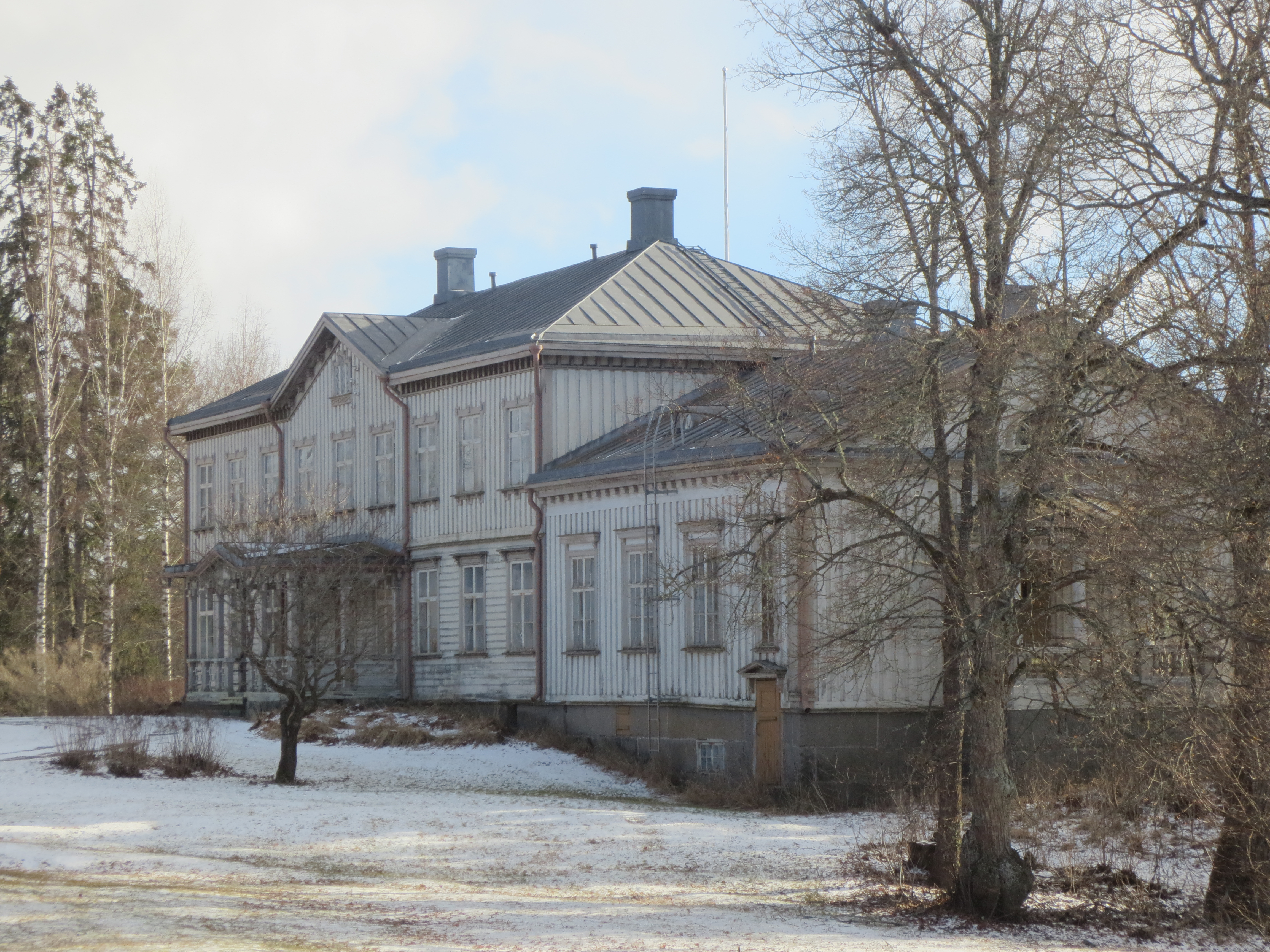 Teiskolan kartanon päärakennus Teiskossa, Tampereella